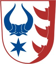 Vlksice /okres Písek/